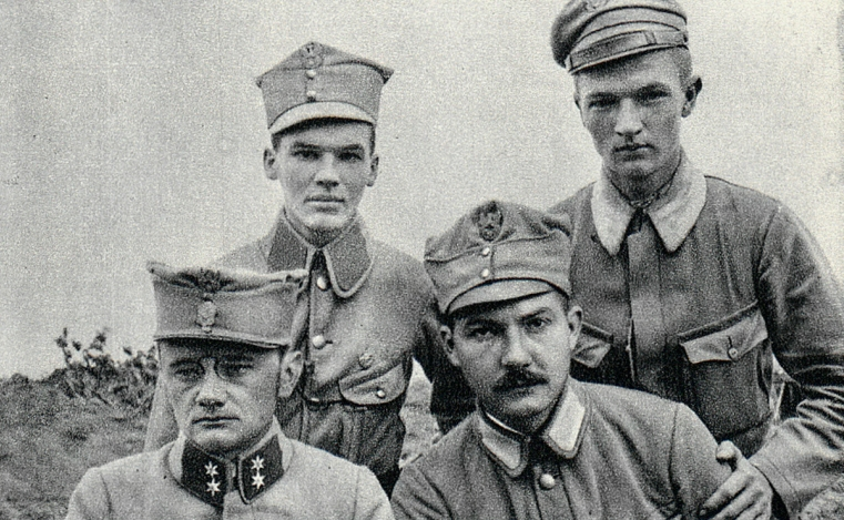 Żołnierze legionowi. Na dole, od lewej: por. Tadeusz Stożek, por. dr Antoni Stefanowski. Na górze od lewej: chor. Mierzwiński, chor. Henryk Serwaczyński.